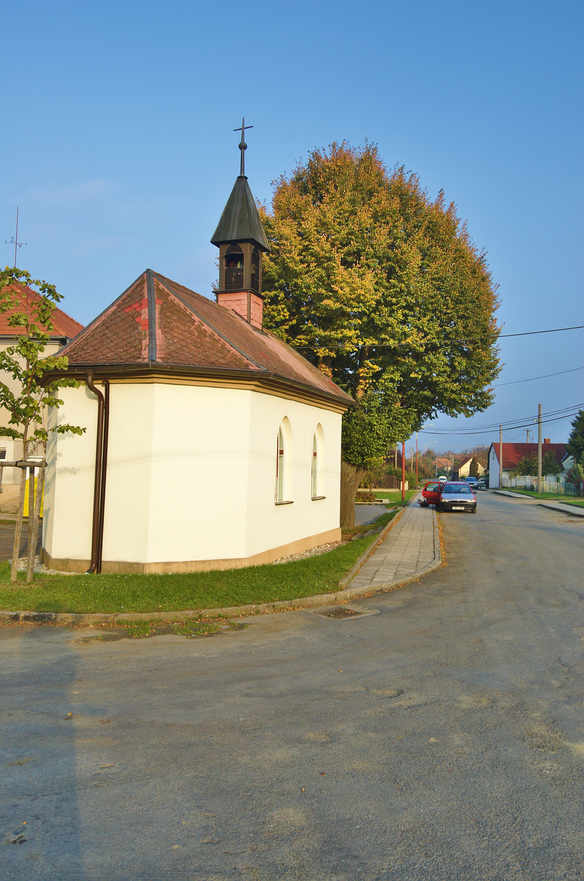 Kaple svatého Václava, Ochoz, okres Prostějov